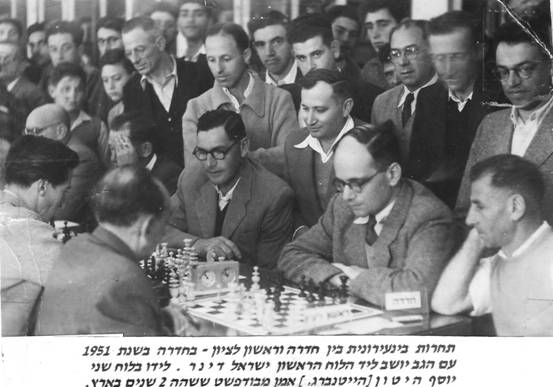 מקור צילום: מועדון השחמ"ט ראשון לציון